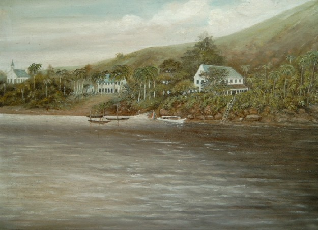 Aquarell von Berg en Dal, Suriname circa 1885